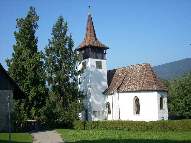 Kirche